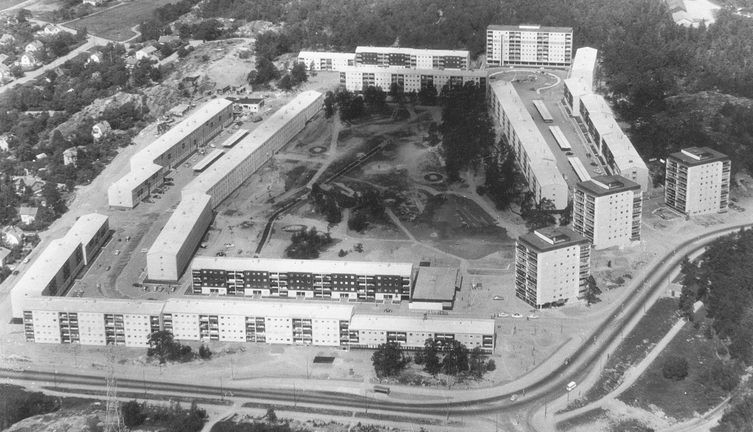 Kvarteret Stamtavlan i Östberga